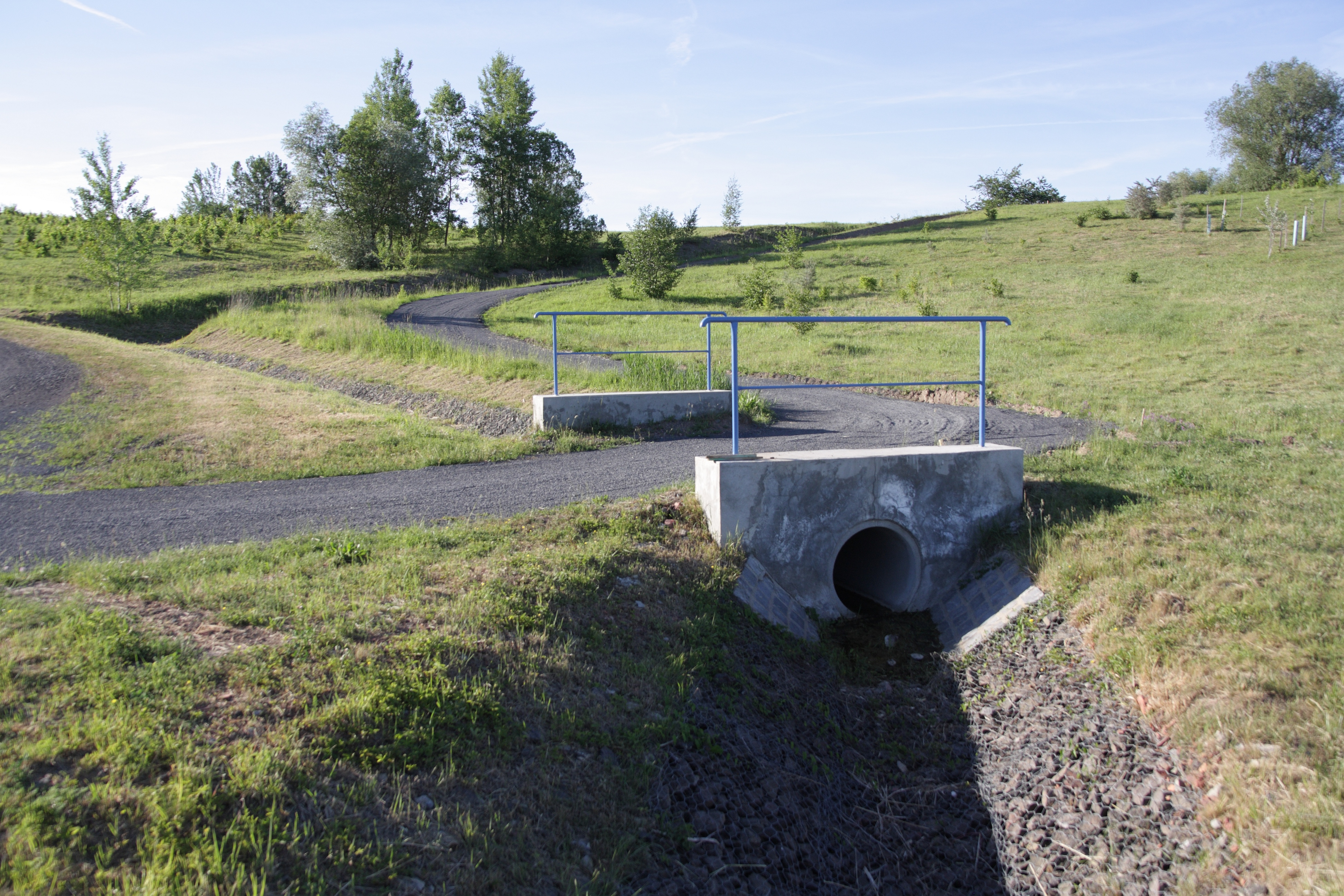 Jezero Milada - propustek